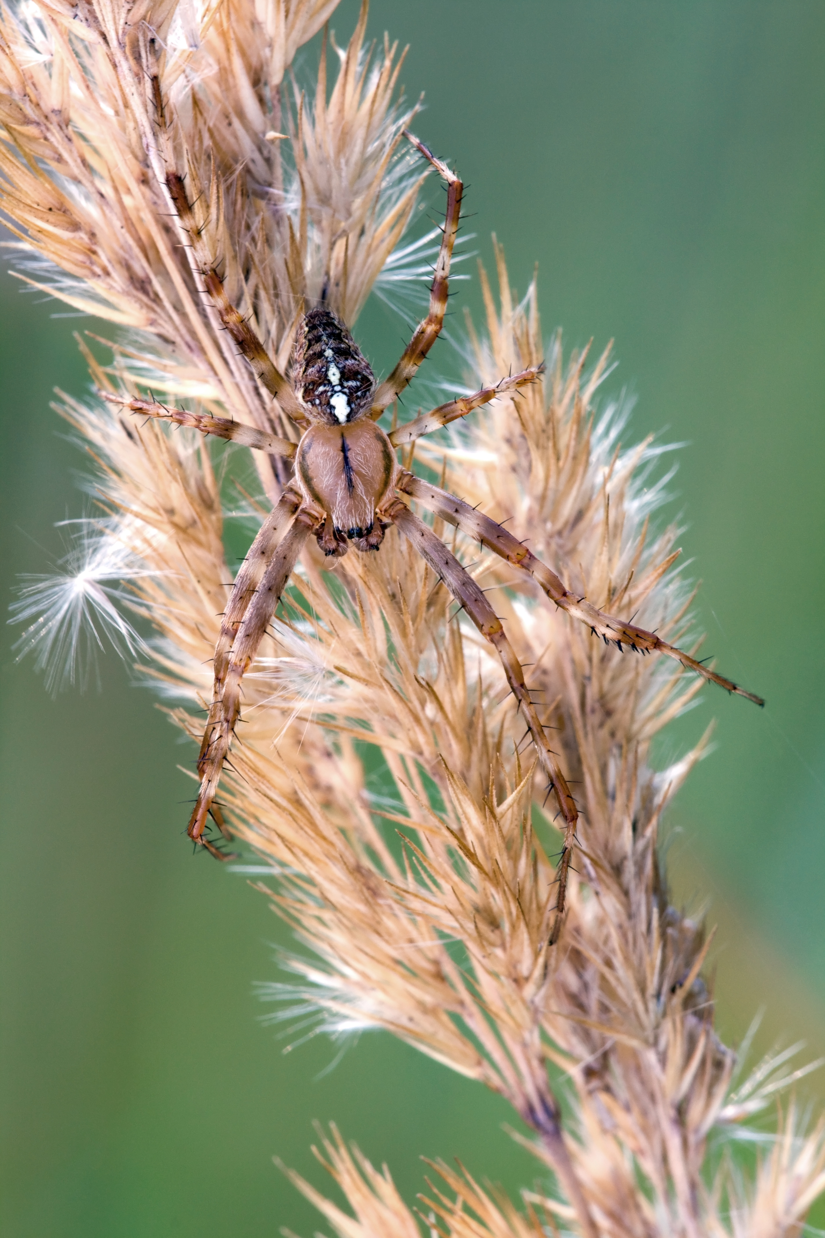 Gartenkreuzspinne - Araneus diadematus, Männchen